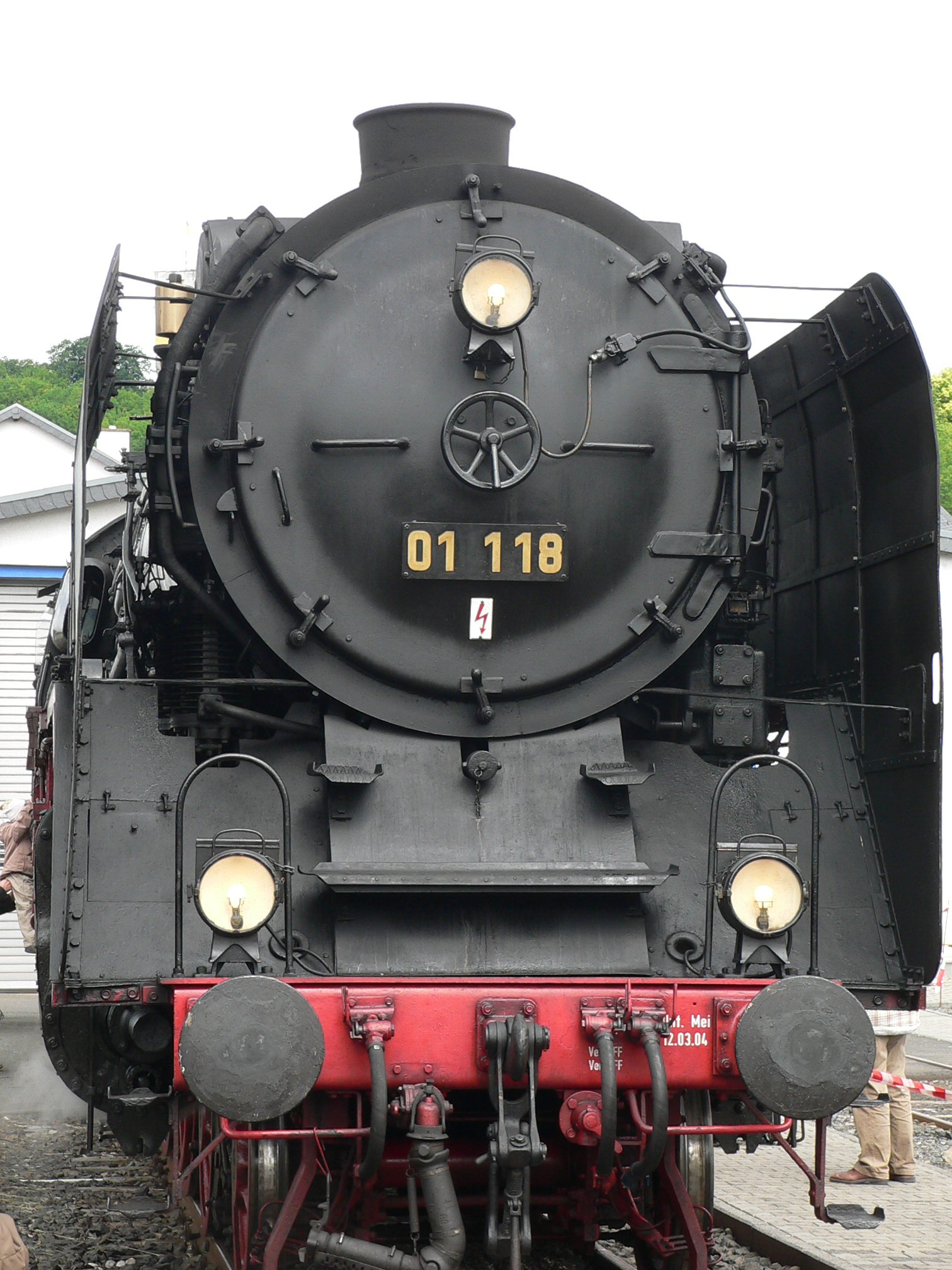 Dampflokomotive 01 118 im Bahnhof Königstein